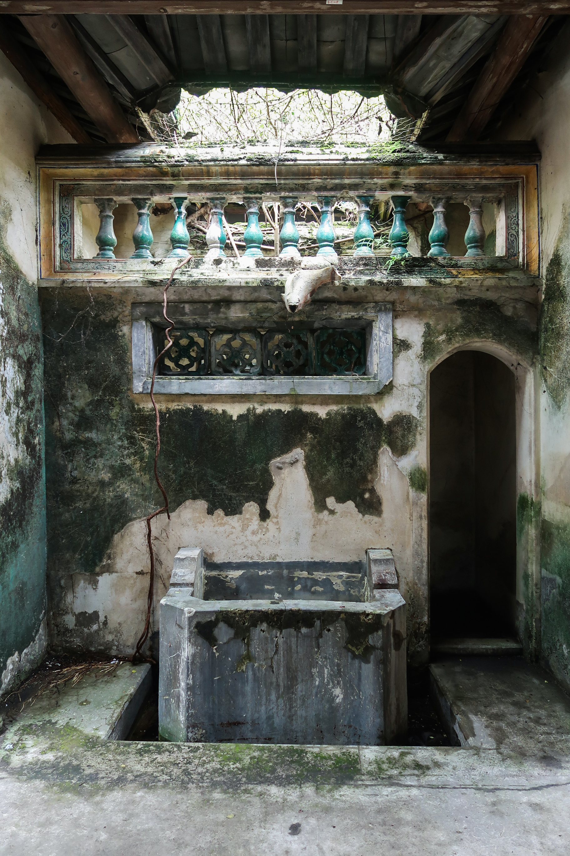 Pun Uk Mansion